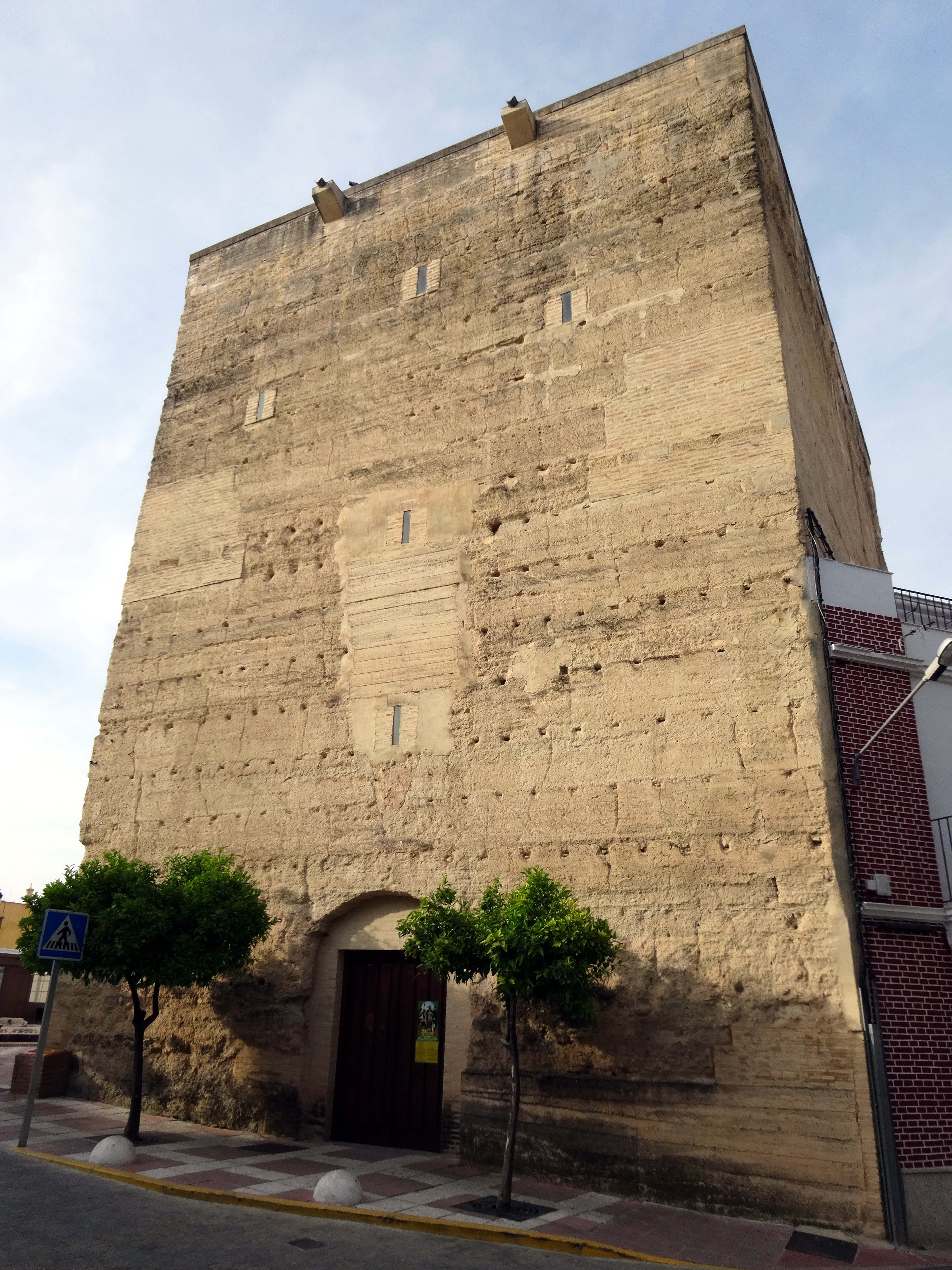 Torre del Homenaje del castillo de La Rambla, provincia de Córdoba (España).